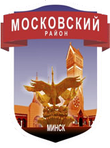 Герб Маскоўскага раёна г. Мiнска